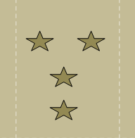 ՀՀ ԶՈՒ կապիտան զինվորական կոչում